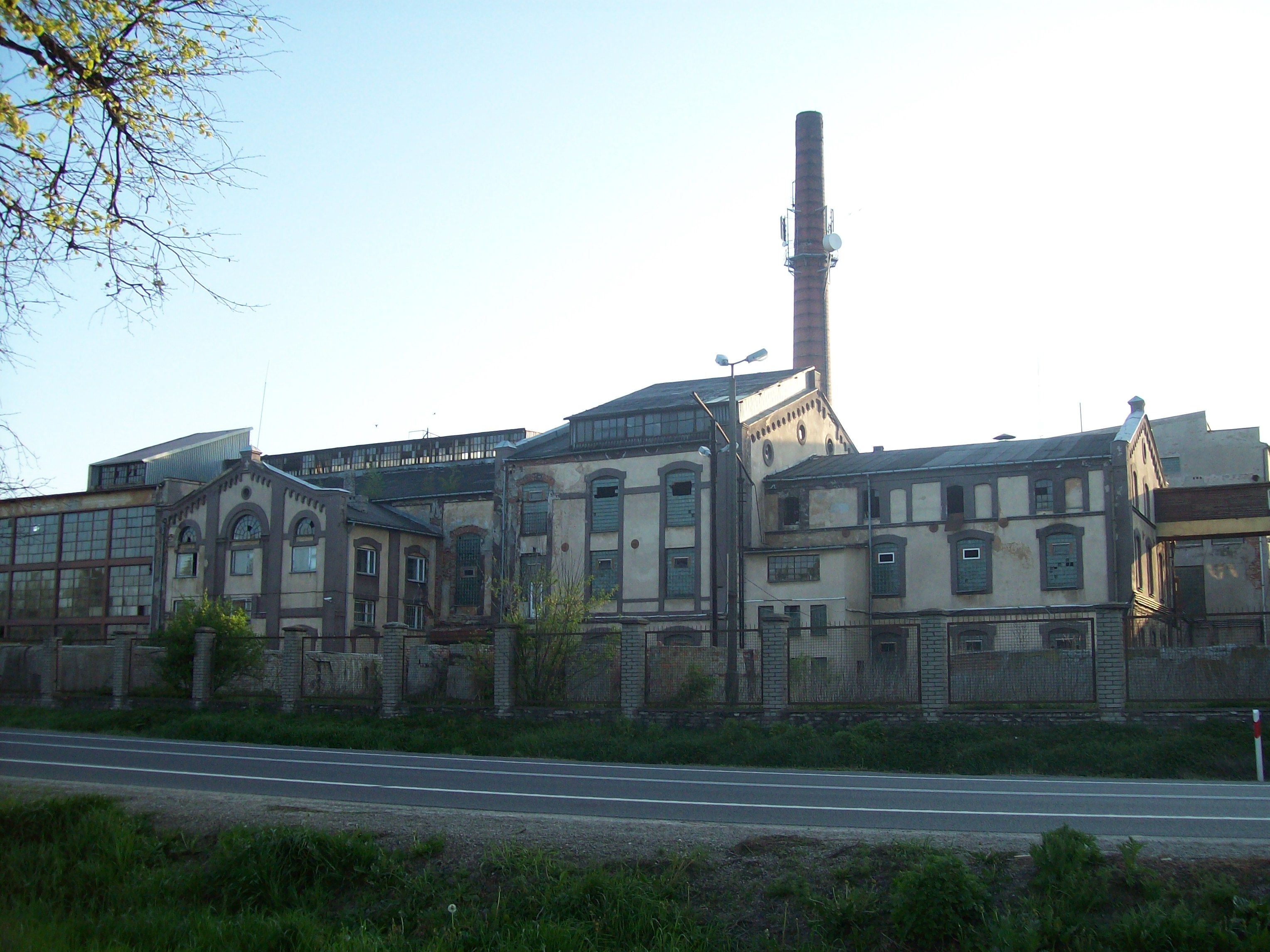 Nieczynna cukrownia we Włostowie.